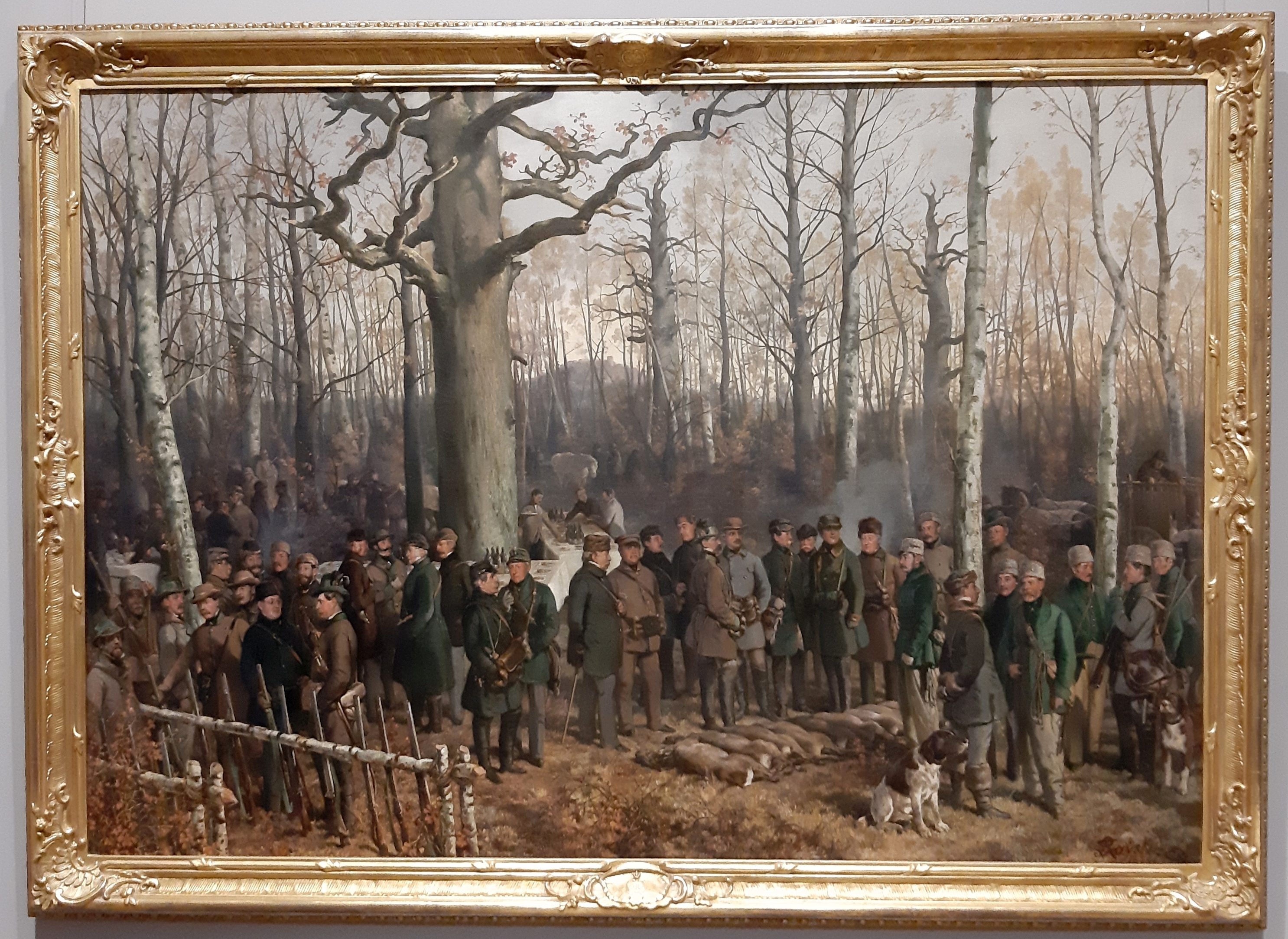 Ferdinand von Rayski - Jagdpause im Wermsdorfer Wald 1859, Öl auf Leinwand Im Bestand des Musée de la chasse et de la nature, Paris